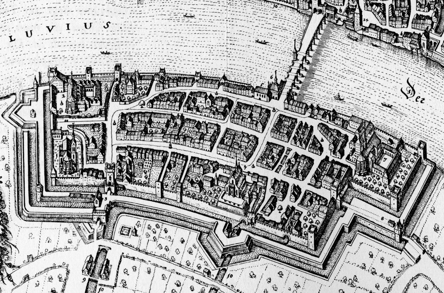 Ausschnitt aus dem Vogelschauplan der Stadt Basel im Jahr 1642 von Matthäus Merian d.Ä.